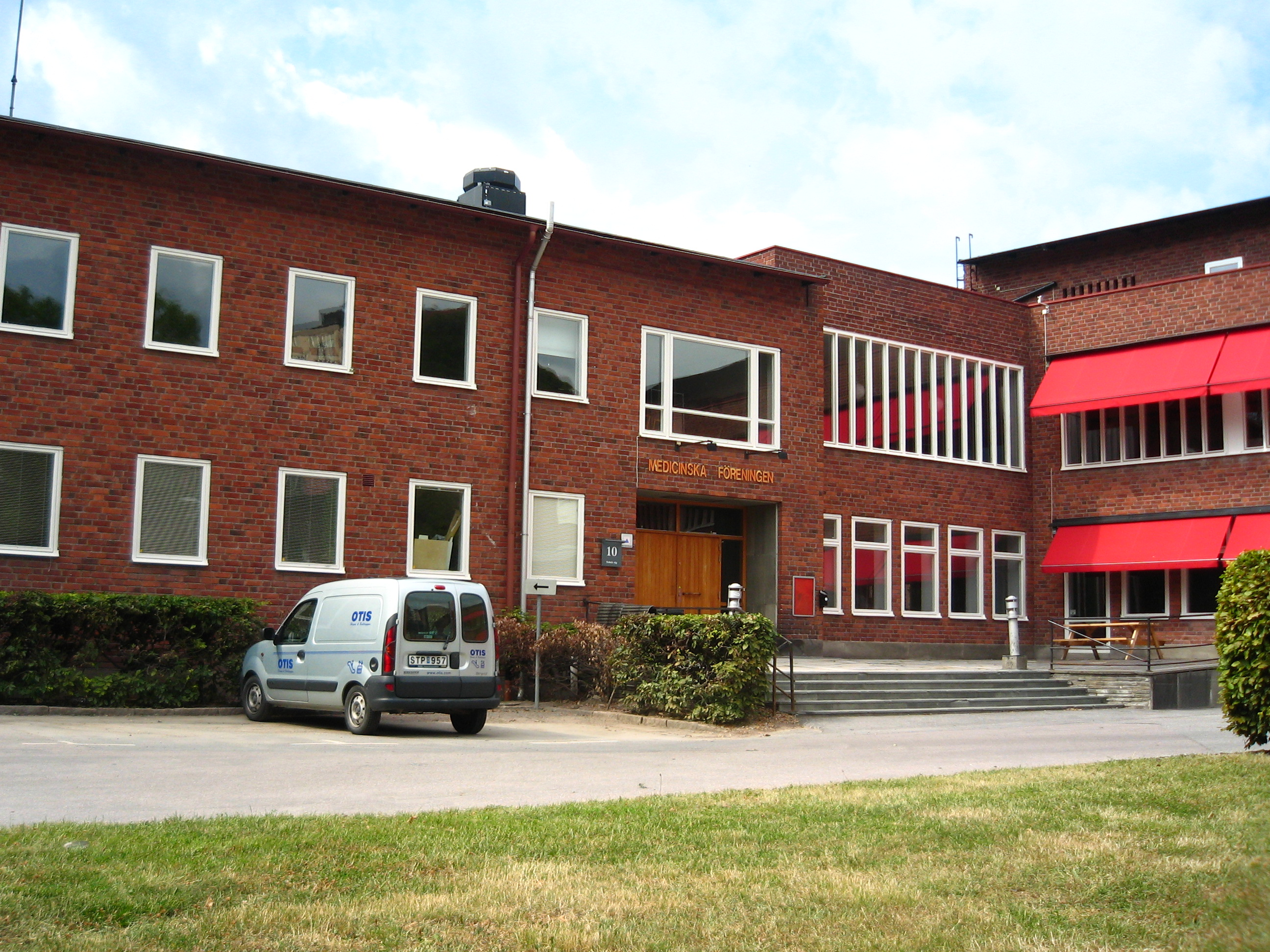 Medicinska Föreningens kårlokal, KI Solna. Arkitekt: Ture Ryberg, ombyggnad: Rosenbergs Arkitekter AB